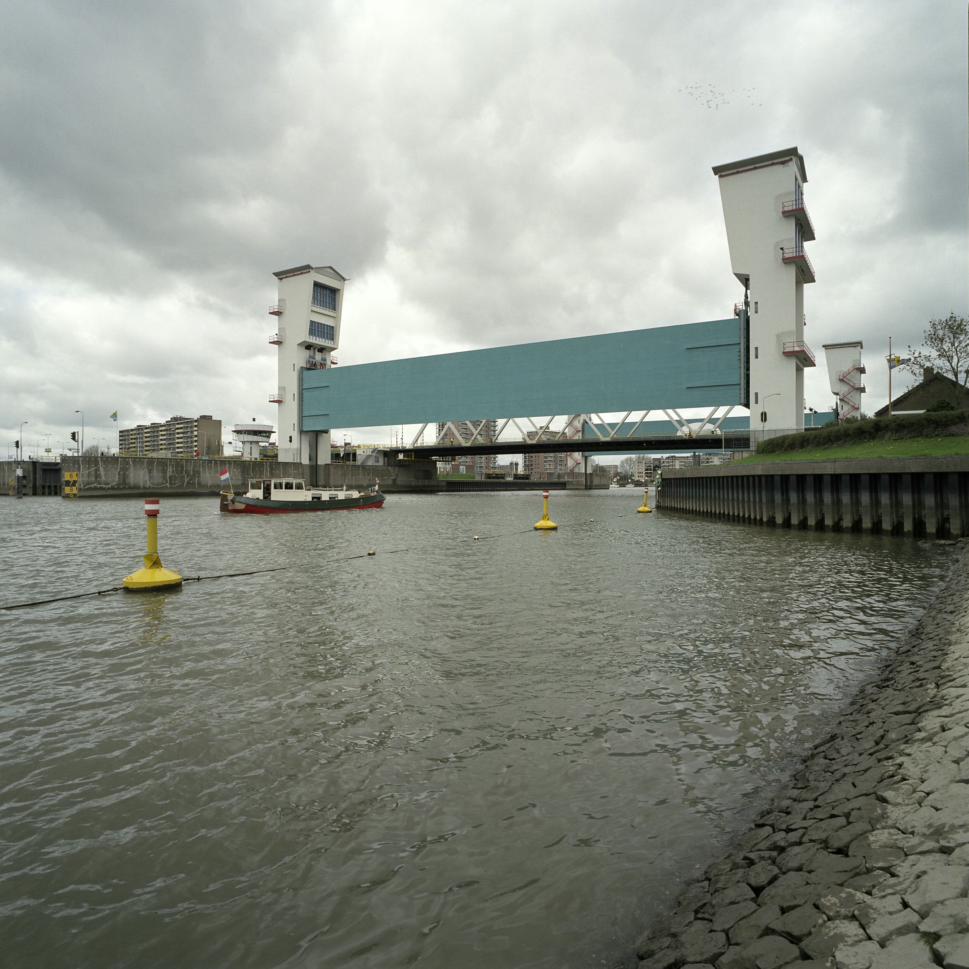 Stormvloedkering Hollandse IJssel - Grendel van Holland: Overzicht van de buitenzijde van de zuidelijke stalen stormvloedschuif met de betonnen heftoren